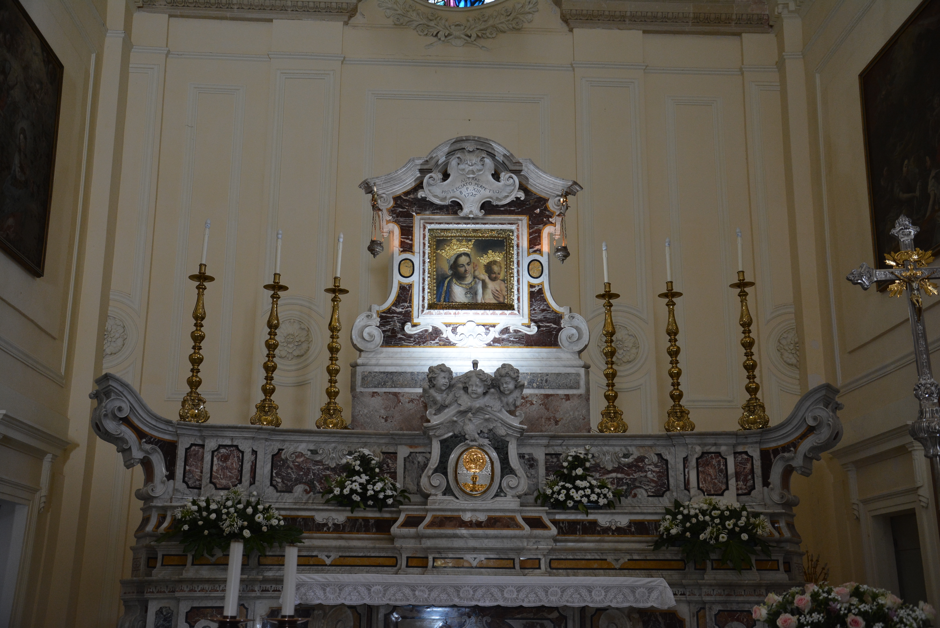 Basilica di Santa Maria de Finibus Terrae